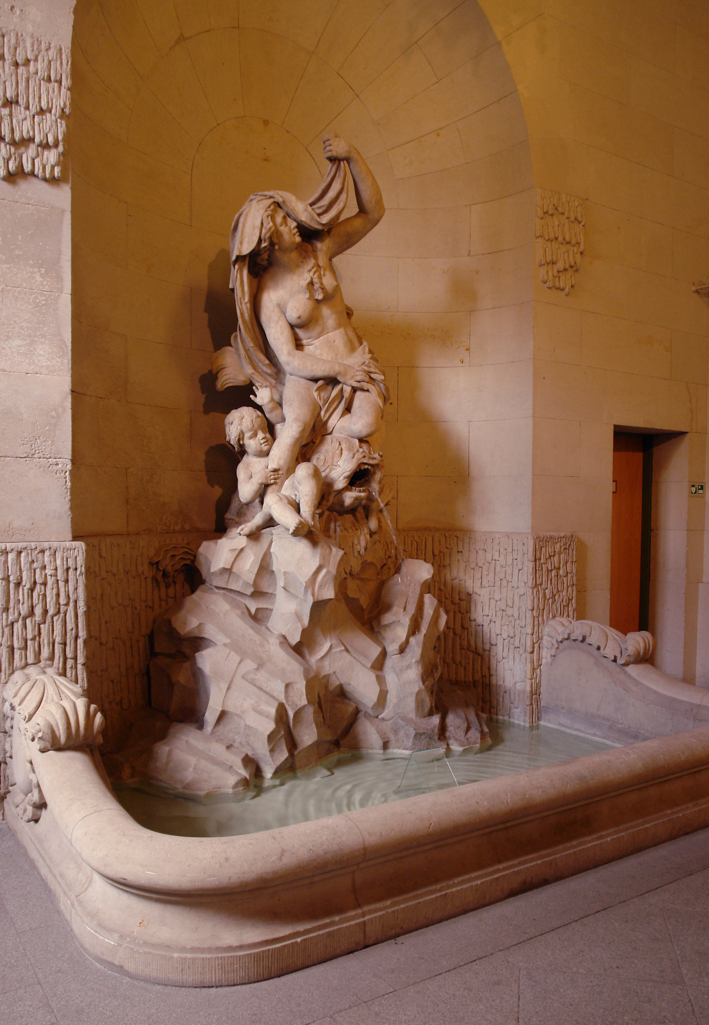 "Amphitrite" linke Brunnenfigur im Eingangsbereich des Sächsischen Ständehauses Dresden